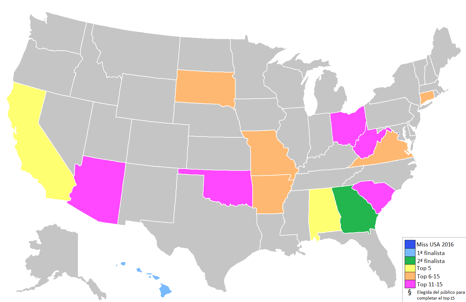 Miss USA 2016 Results